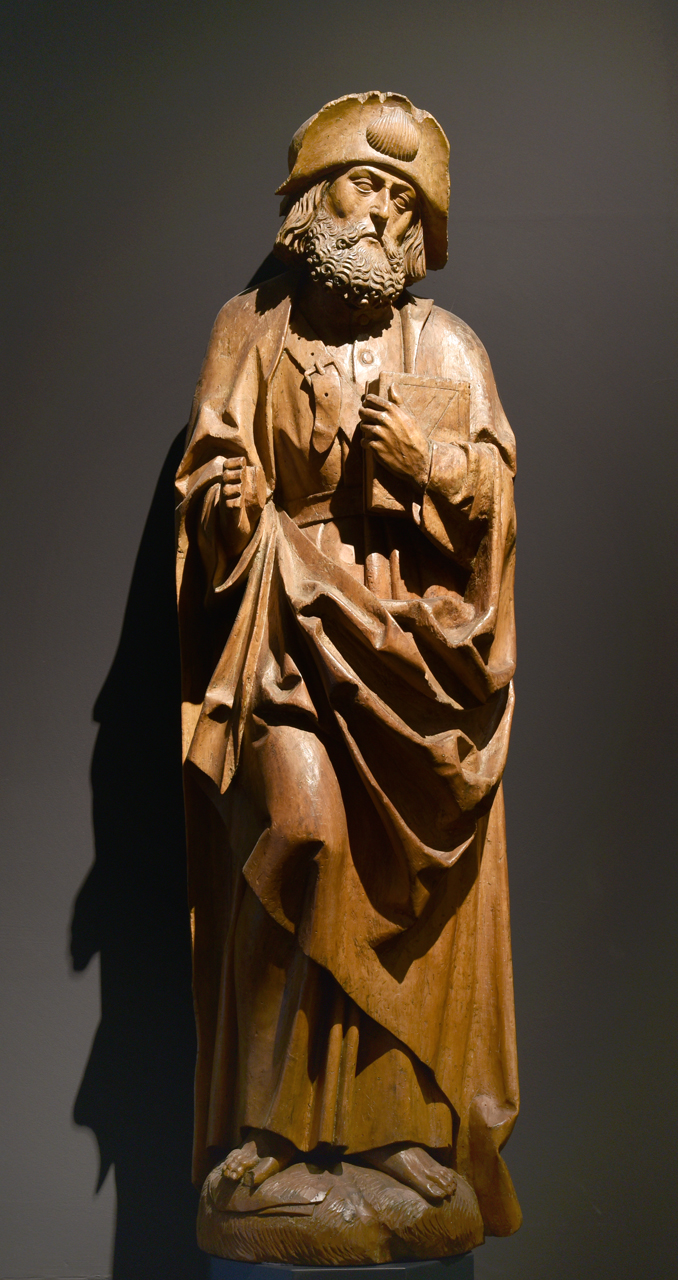 Sv. Jakub Větší (kolem r. 1520), Františkovy Lázně, expozice Galerie výtvarného umění v Chebu